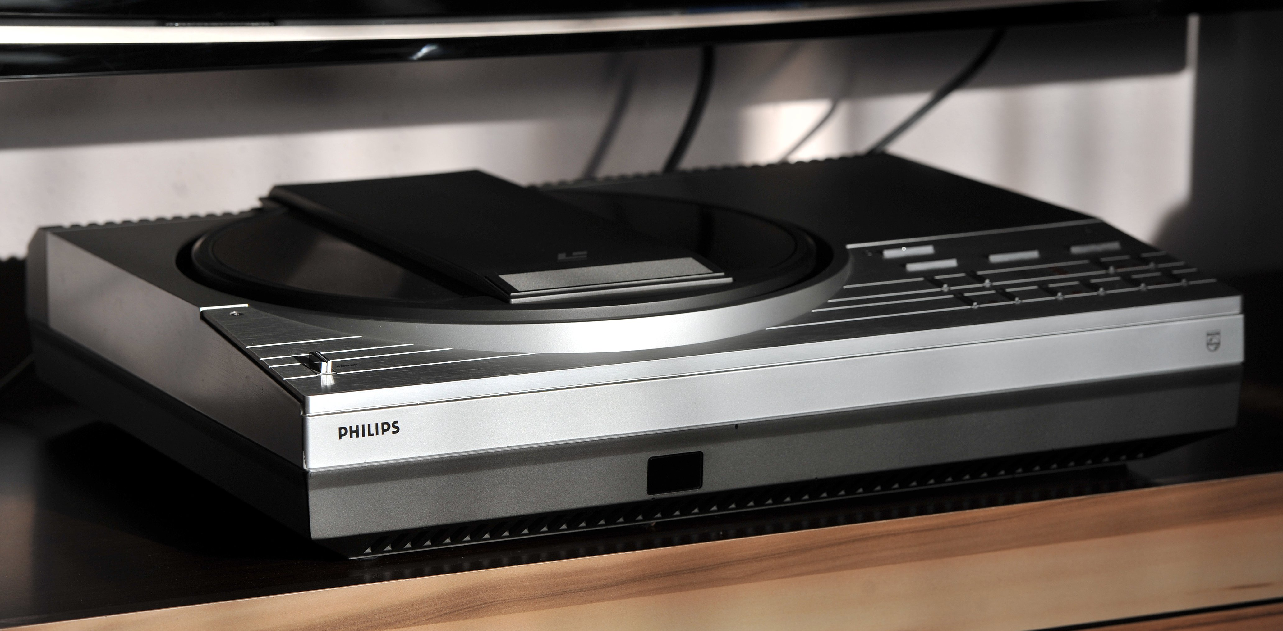 Laserdiscplayer Philips VLP 720, 1982